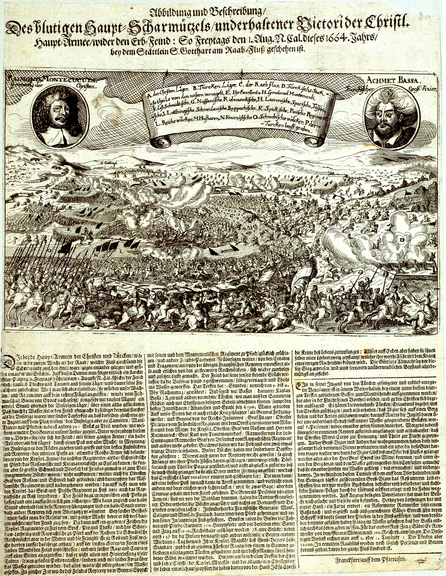 Kupferstich mit Abbildung und Beschreibung der Schlacht der kaiserlichen Truppen unter Feldmarschall Montecuculi gegen die Türken bei St. Gotthart (Szentgotthard) / Mogersdorf an der Raab, am 1. August 1664